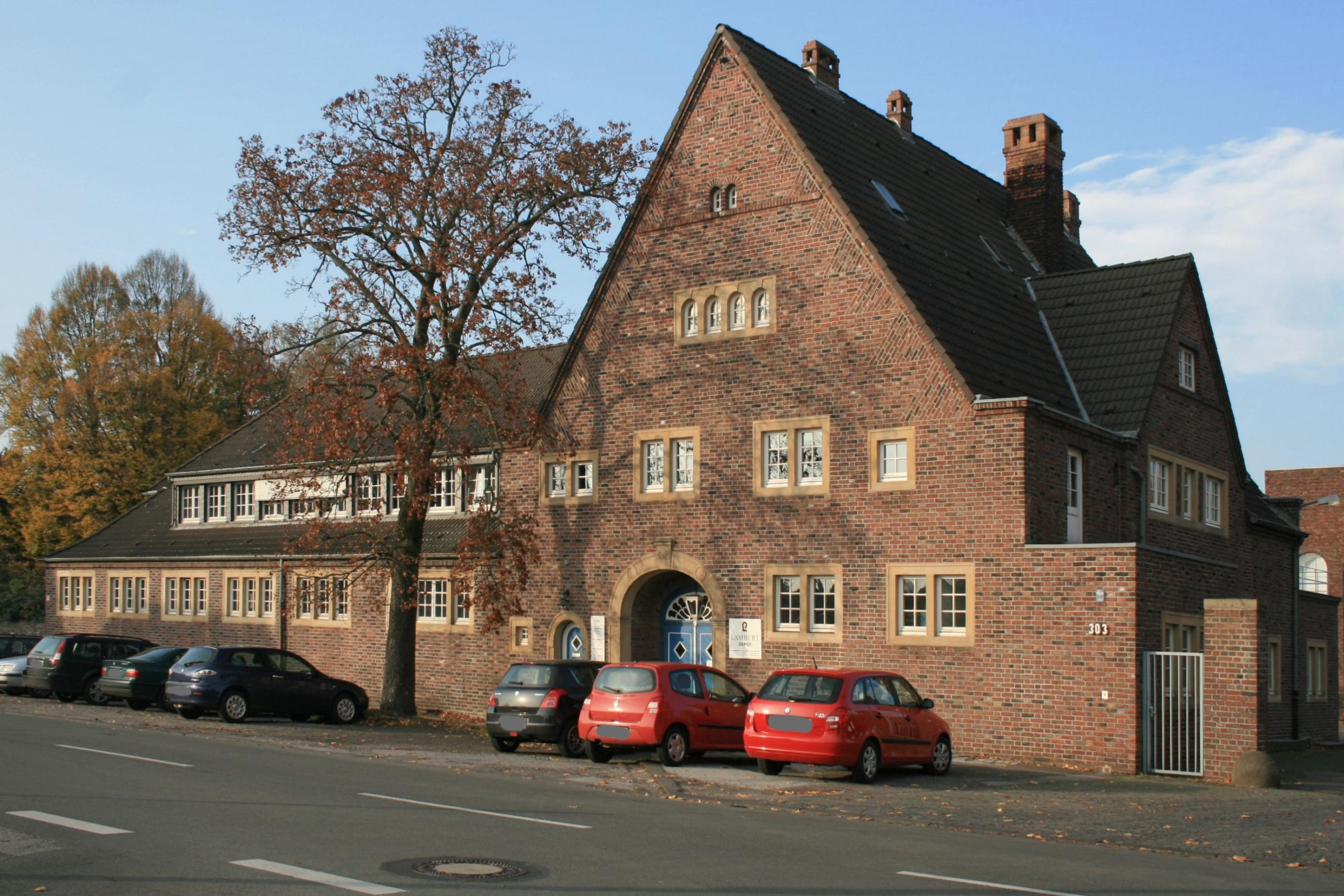 Industriekomplex Konstantiner Straße 303 Mönchengladbach